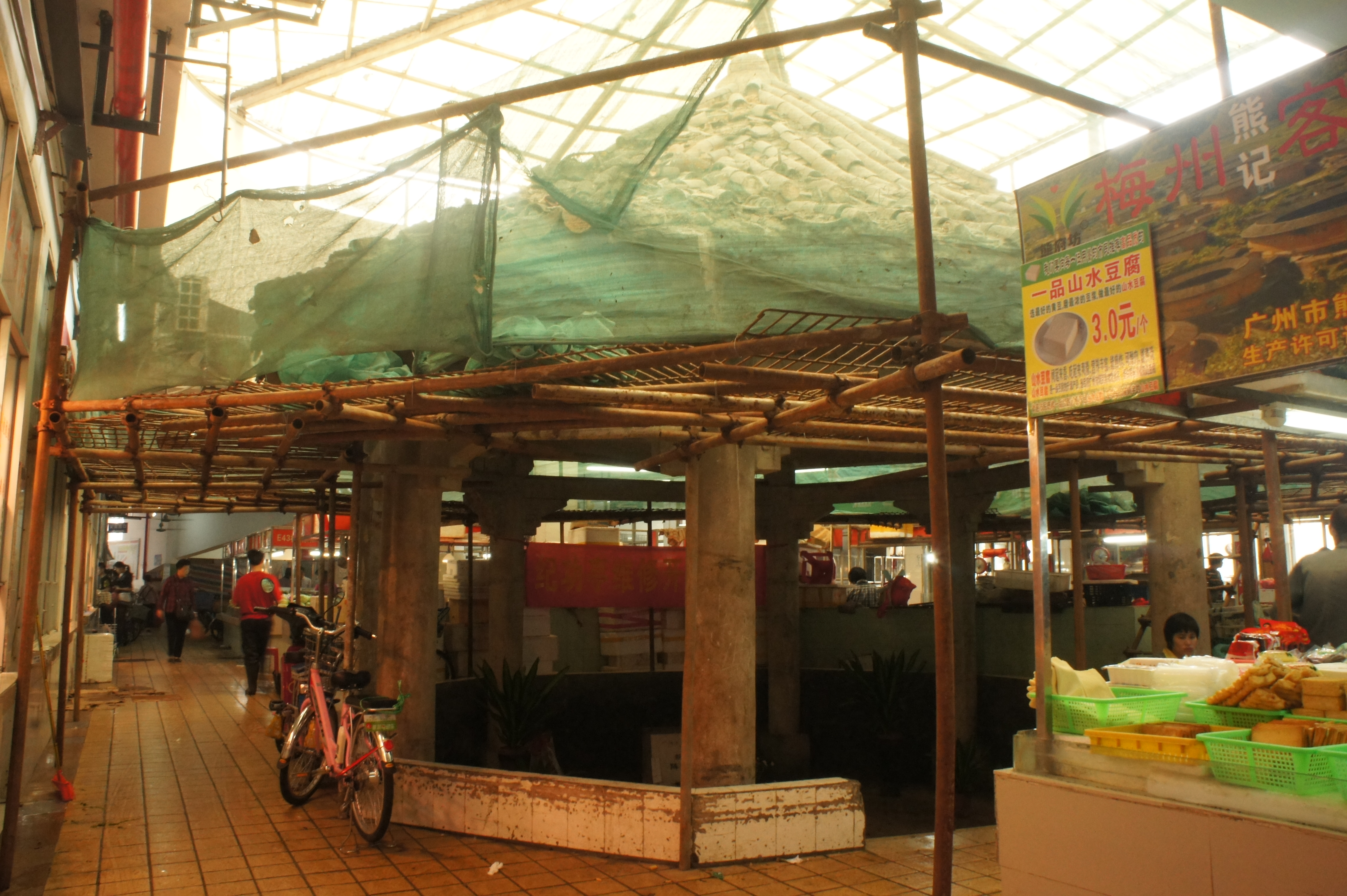 廣州市新一軍印緬陣亡將士公墓紀功亭（準備維修）